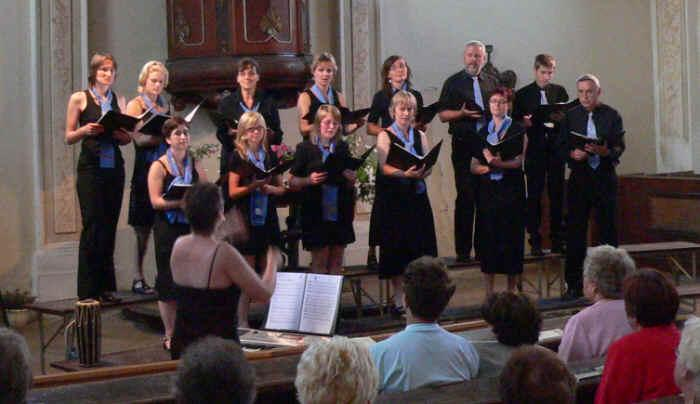 Komorní sbor Festivia Chorus